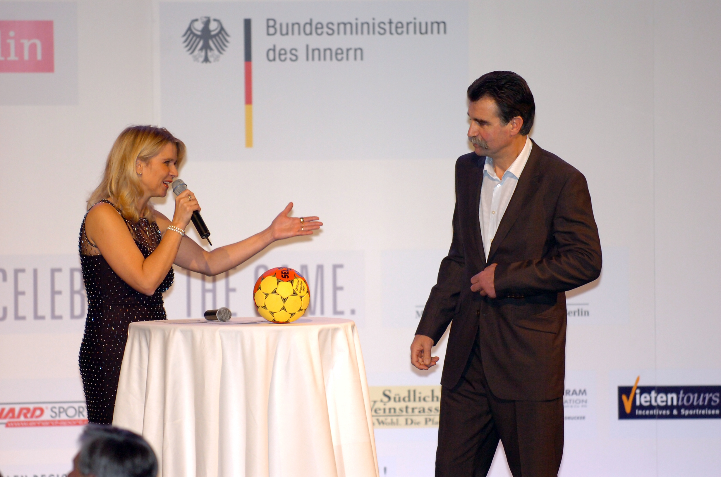 Petra Vieten bei der Moderation der Eröffnungsgala der Handball-WM 2007 mit Bundestrainer Heiner Brand in der Mercedes-Welt, Berlin.